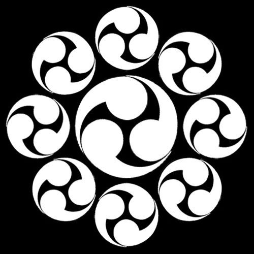 「九曜巴」紋（染抜）